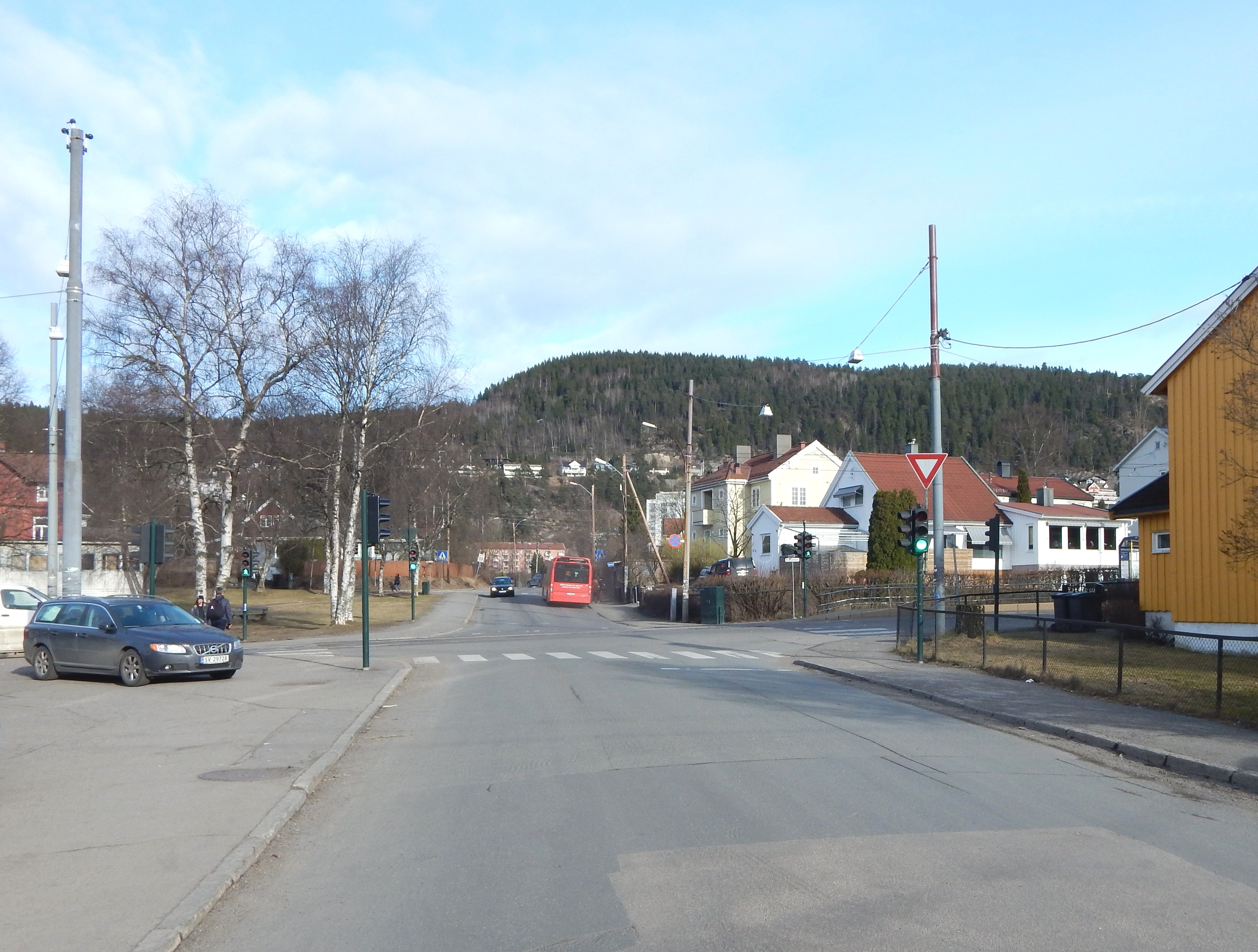 Marsveien mot Grefsenveien og Myrerskogveien